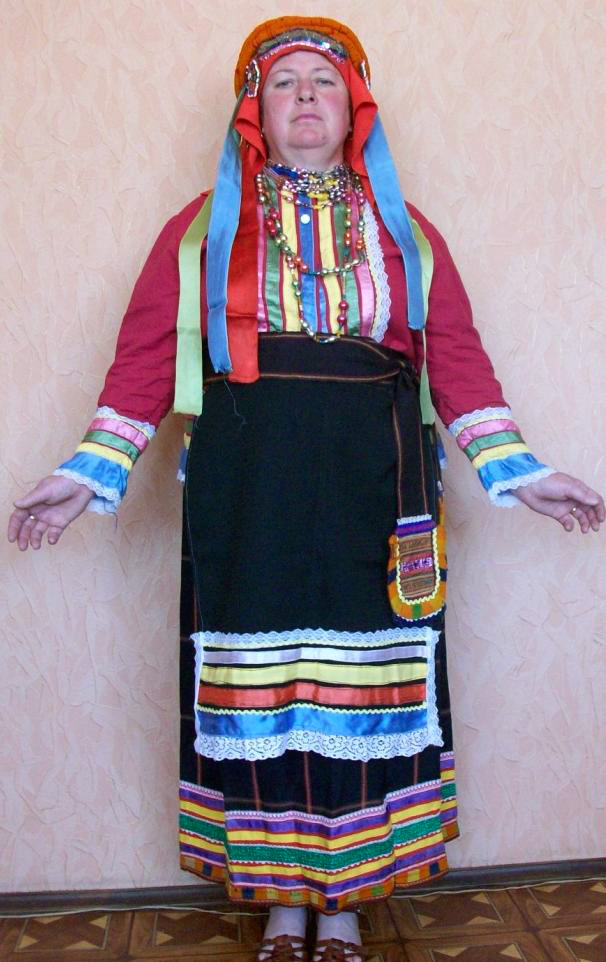 Новосолдатка. Традиционный костюм Репьевского района Воронежской области.